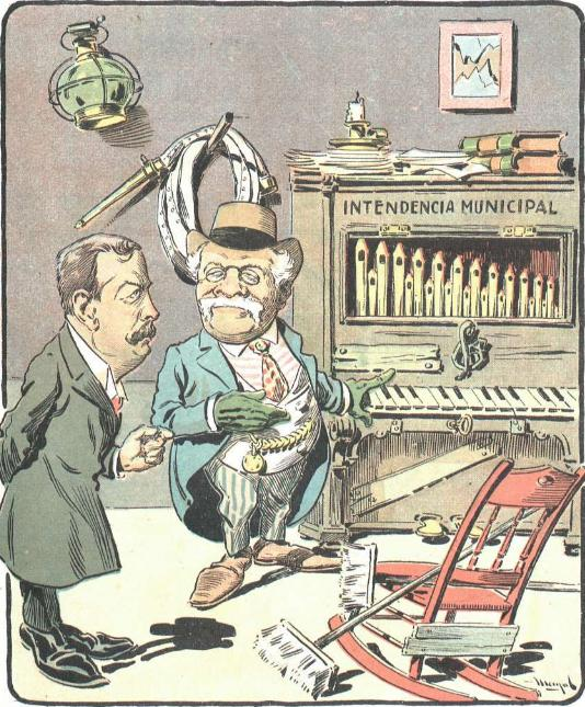 Adolfo Bullrich le indica a su sucesor, Alberto Casares, que "nunca supo cómo se tocaba" [la Intendencia de Buenos Aires] y que siempre lo hizo de oído, ayudado del Tesoro Nacional.